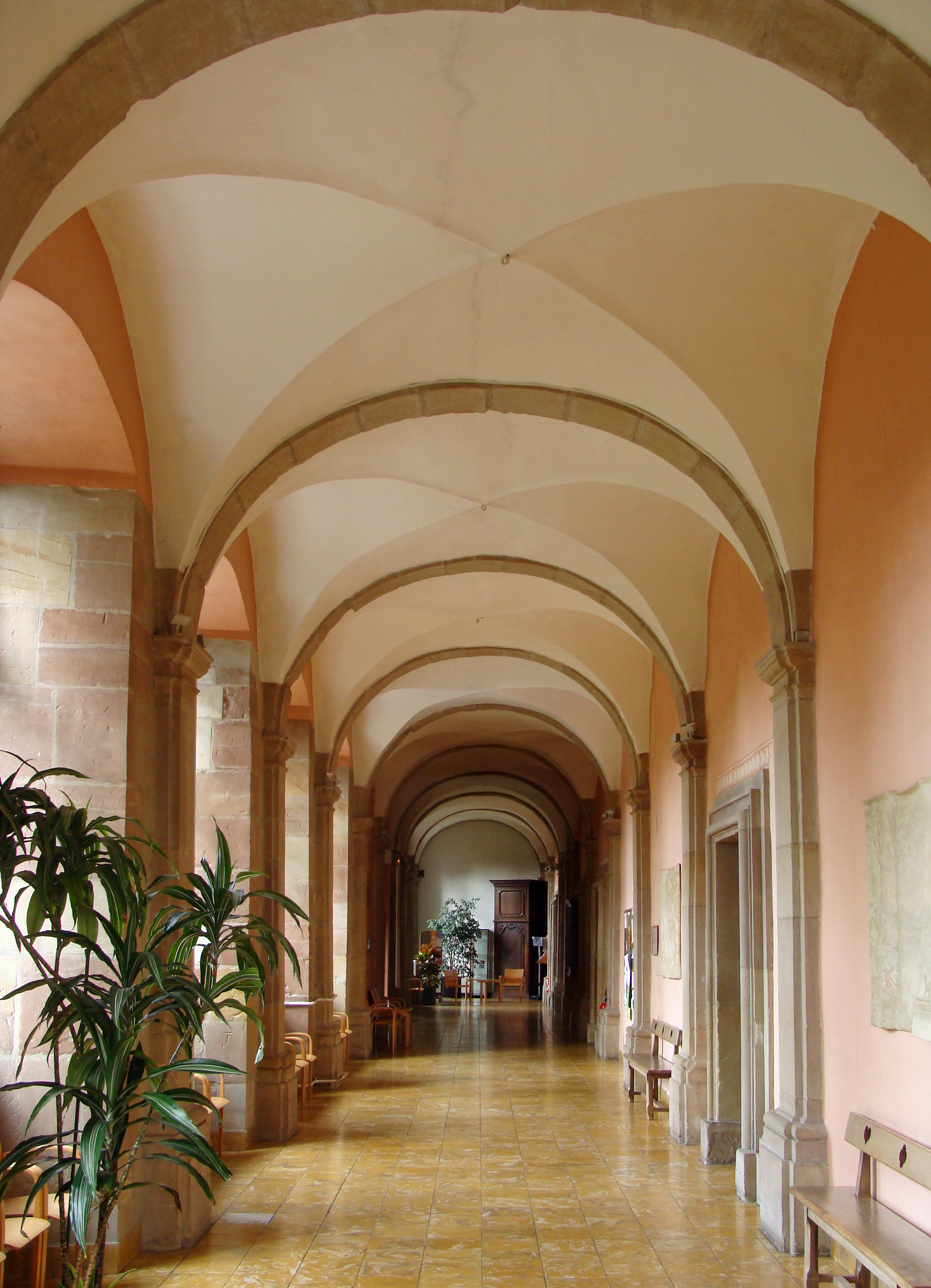 Abbaye Saint-Martin-des-Glandières. Vue de la grande galerie (Nord). Abbaye située à Longeville-lès-Saint-Avold.